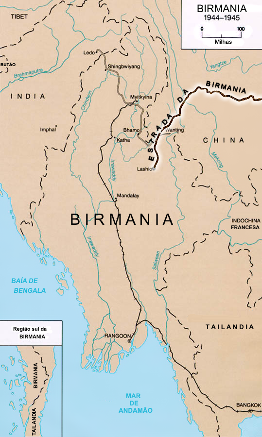 Mapa descritivo da Estrada da Birmânia durante a II Guerra Mundial